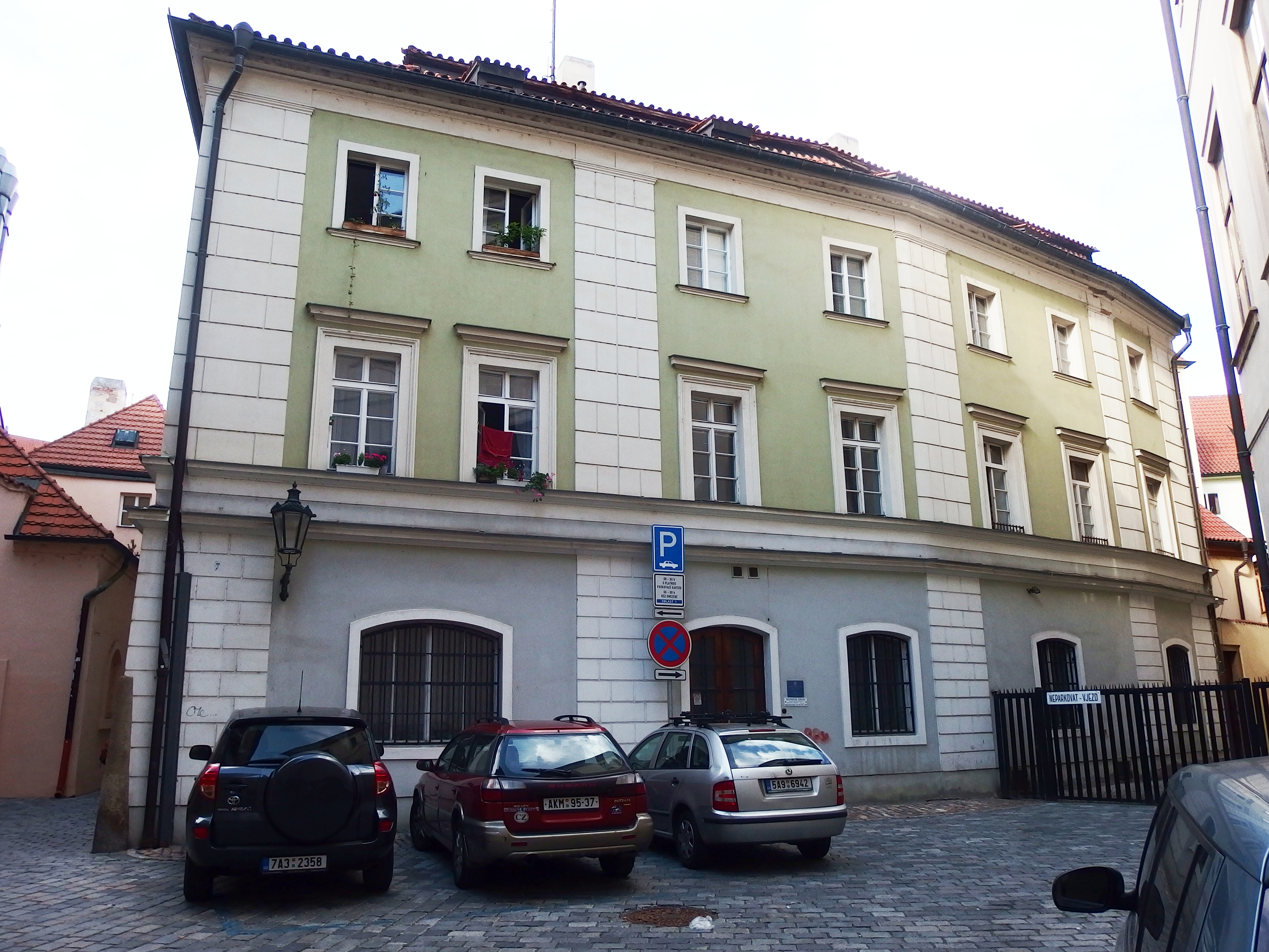 U bílého kamzíka, U tří panen, Kamzíková 542/4, Staré Město (Praha).